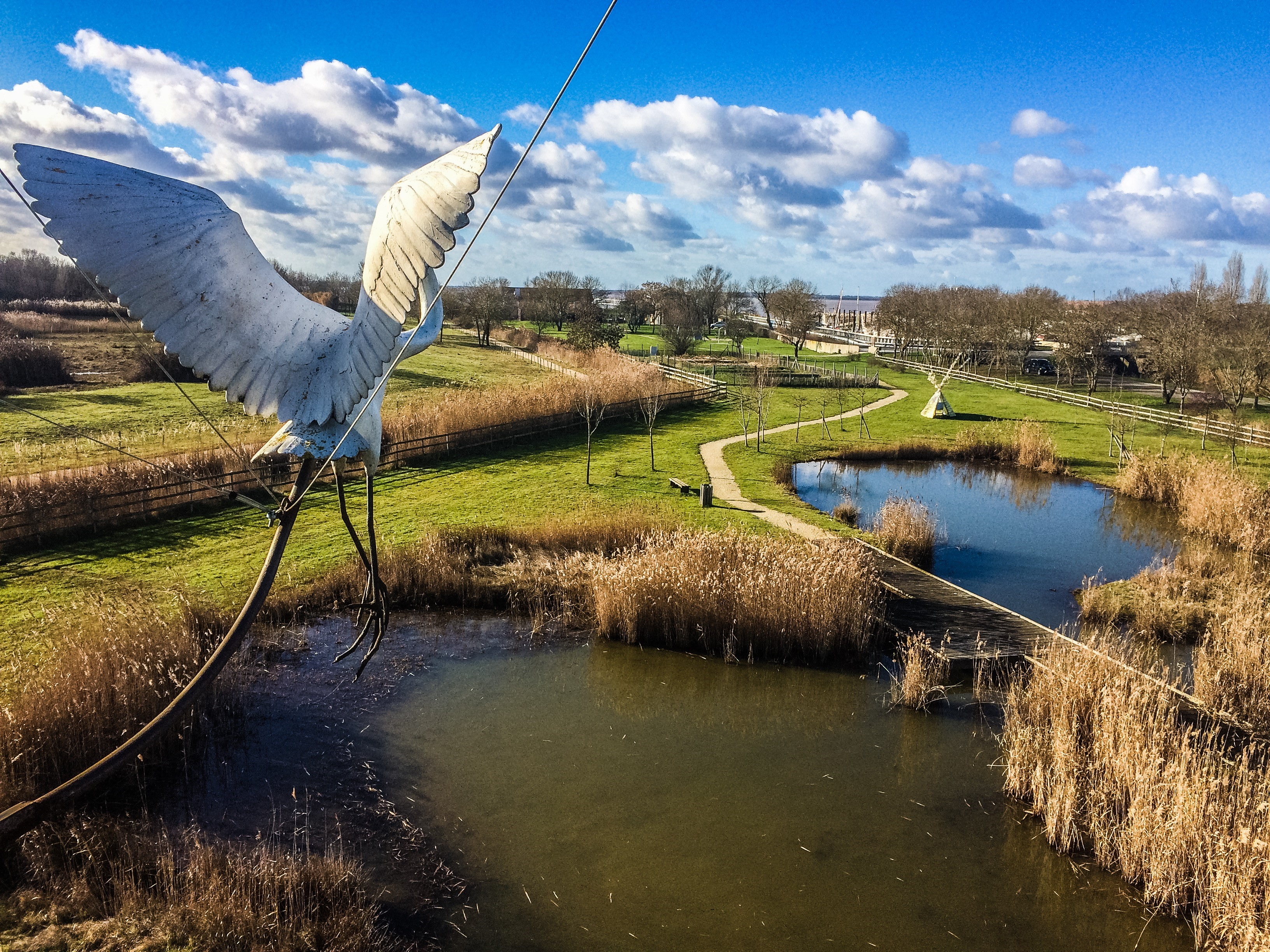 Vue panoramique Terres d'oiseaux, réserve ornithologique de Braud-et-Saint-Louis (Gironde, France).